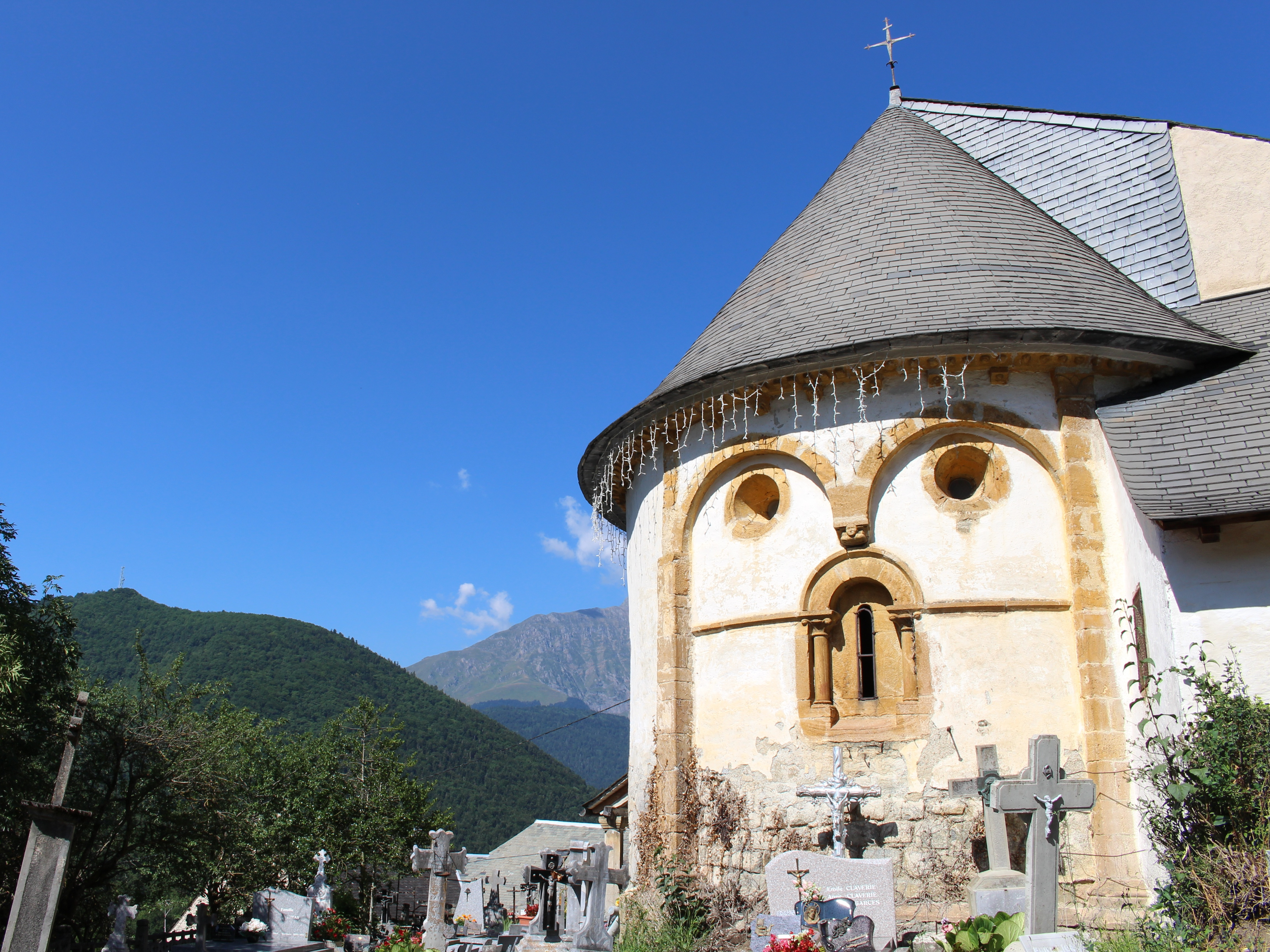 Église Saint-Laurent de Jézeau (Hautes-Pyrénées)